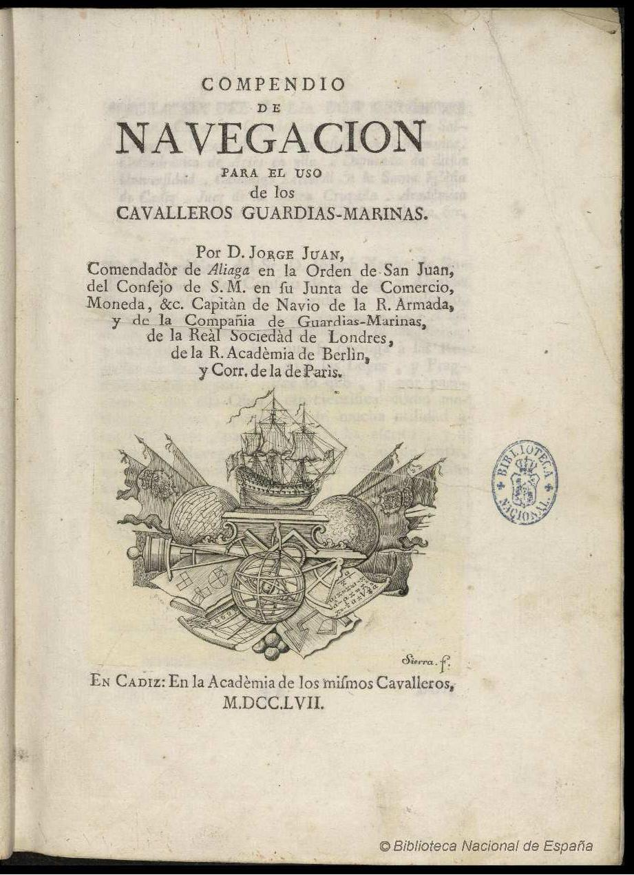 Compendio de navegacion para el uso de los Cavalleros Guardias Marinas, por D. Jorge Juan ... Autor: Juan, Jorge (1713-1773) Fecha: 1757 Datos de edición: En Cadiz, en la Acadèmia de los mismos Cavalleros